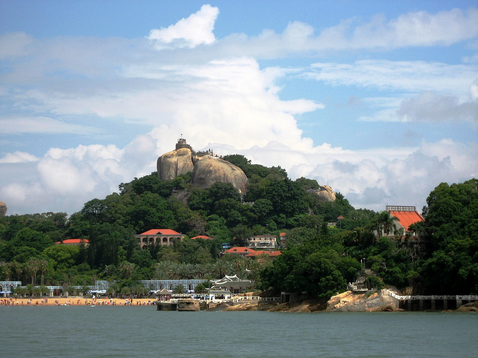 厦门鼓浪屿轮渡望鼓浪屿地标 - 日光岩